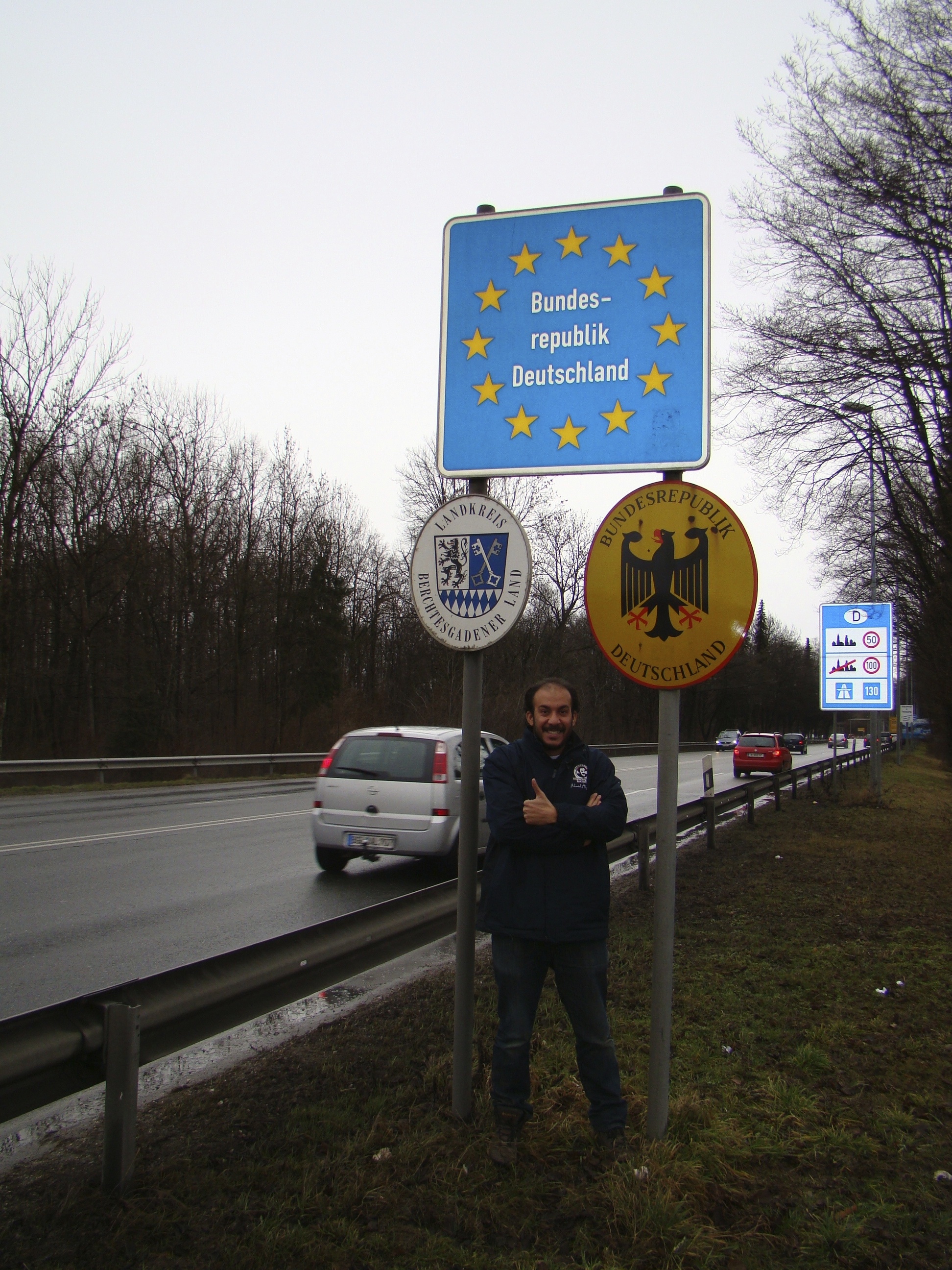 على الحدود ما بين ألمانيا والنمسا